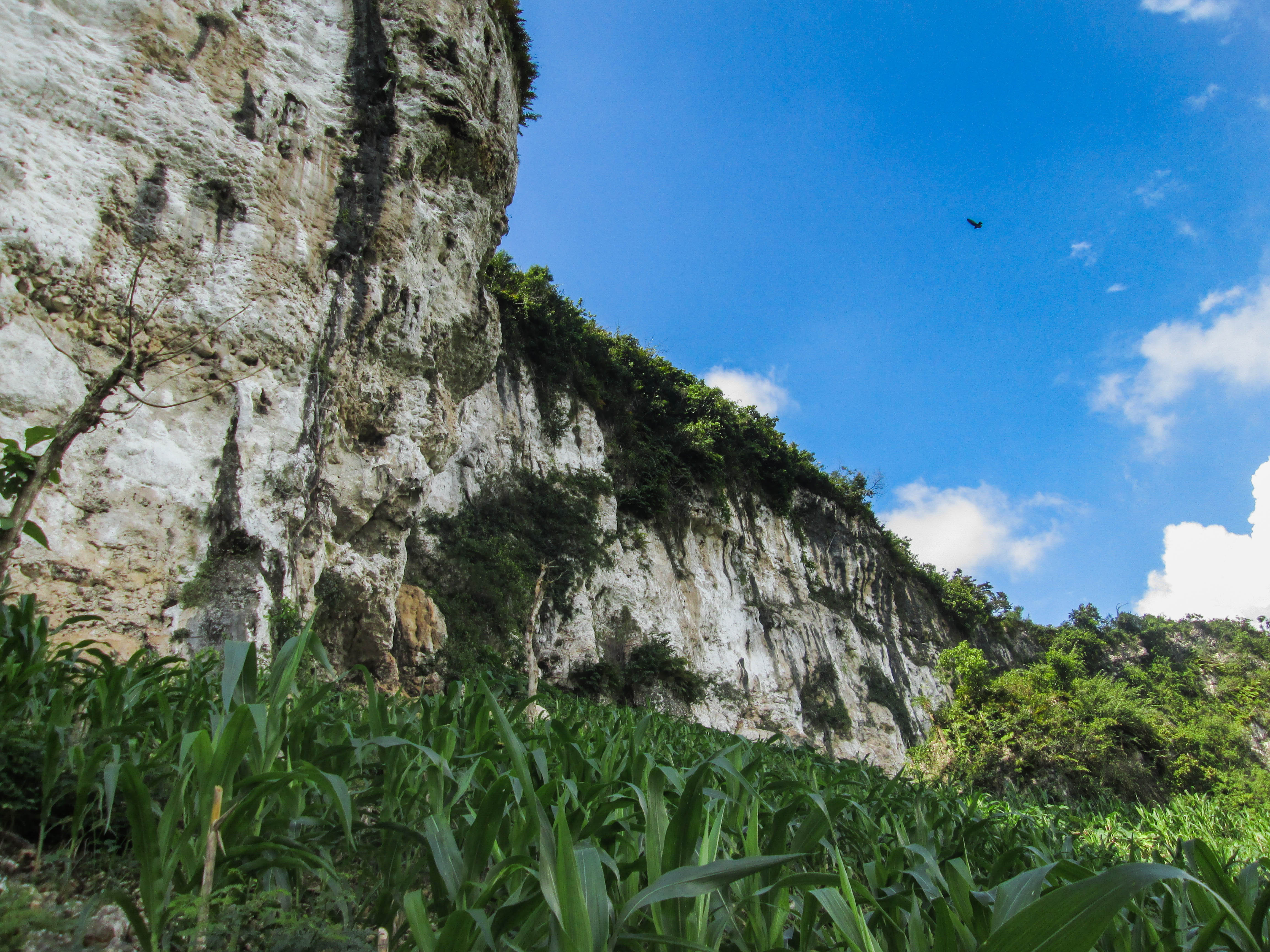 Pegunungan kapur utara, biasa disebut 'Pegunungan Kendeng' yang membentang dari Kabupaten Pati, Jawa Tengah hingga Kabupaten Lamongan, Jawa Timur. menyimpan potensi untuk penggiat panjat tebing, salah satunya di Tebing Trojoyo, Kabupaten Grobogan, Jawa Tengah.